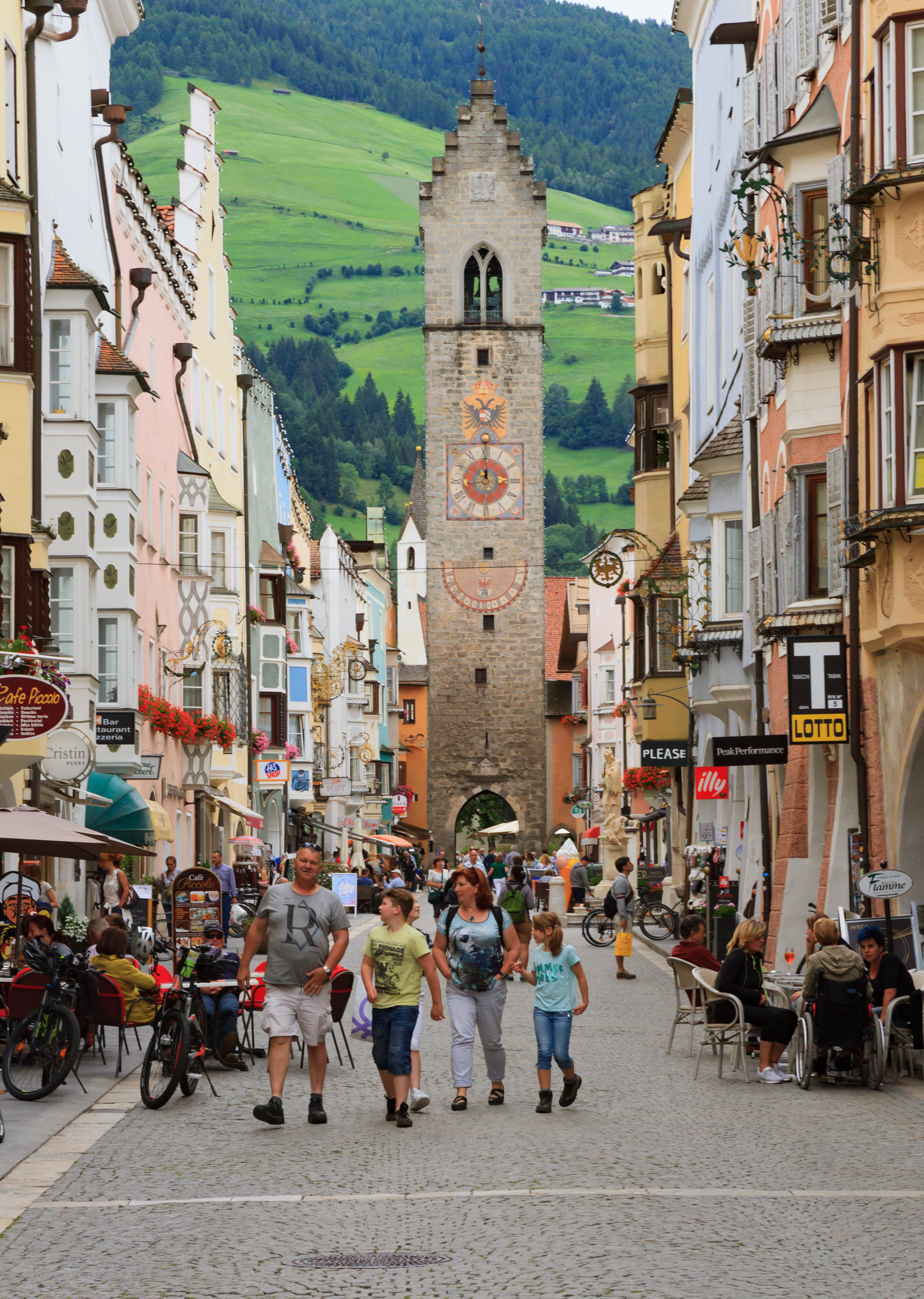 Sterzing- Blick auf den Zwölferturm